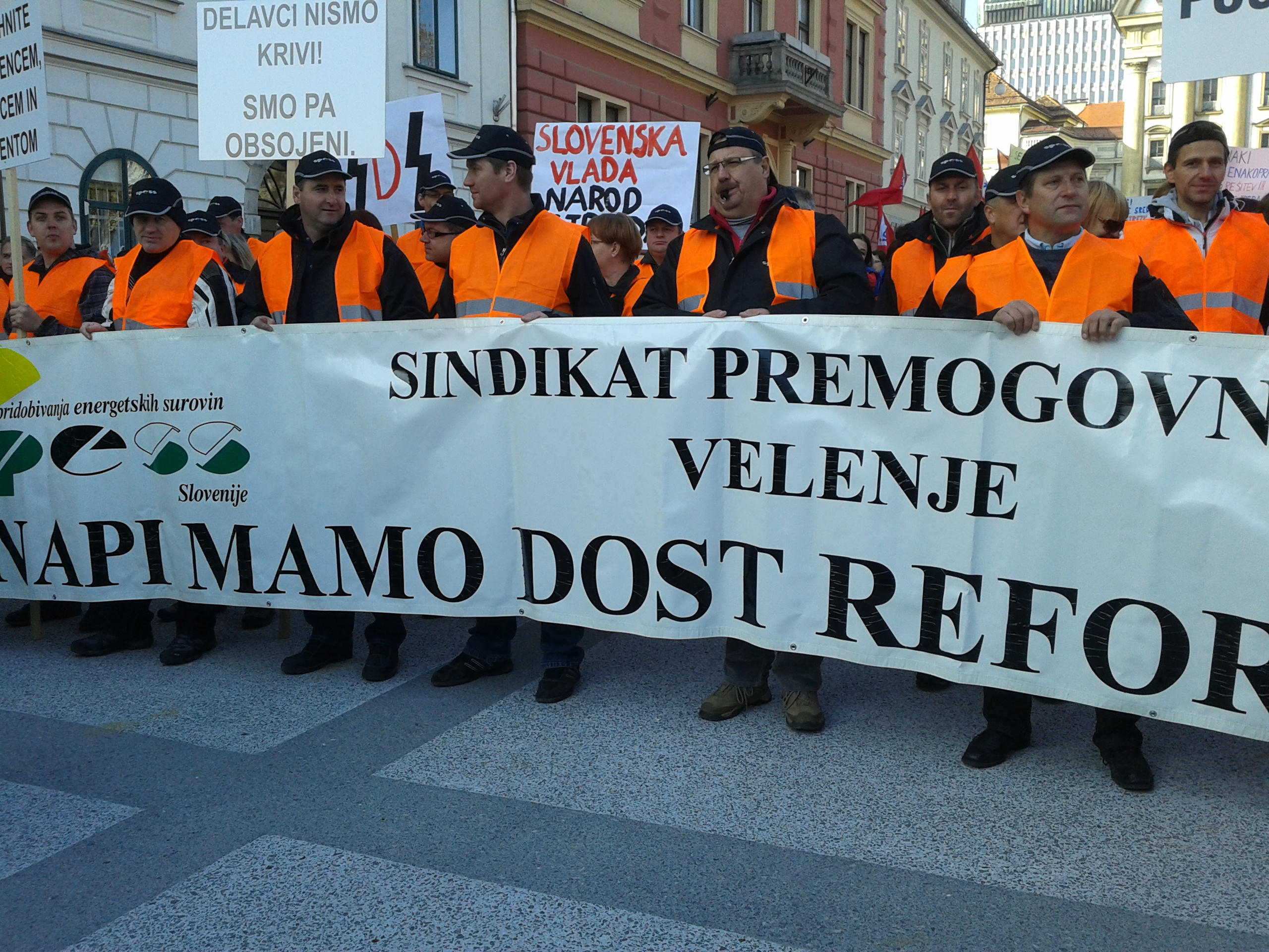 "Knapi mamo dost reform!" Sindikat premogovnikov Velenje. Delavski protesti proti varčevalnim ukrepom, Ljubljana, Kongresni trg, sobota, 17. november 2012. Sindikalne centrale, ki so organizirale demonstracije, so bile: Konfederacija sindikatov javnega sektorja Slovenije (KSJS), Zveza svobodnih sindikatov Slovenije (ZSSS) in Konfederacija novih sindikatov Slovenije - Neodvisnost (KNSS).